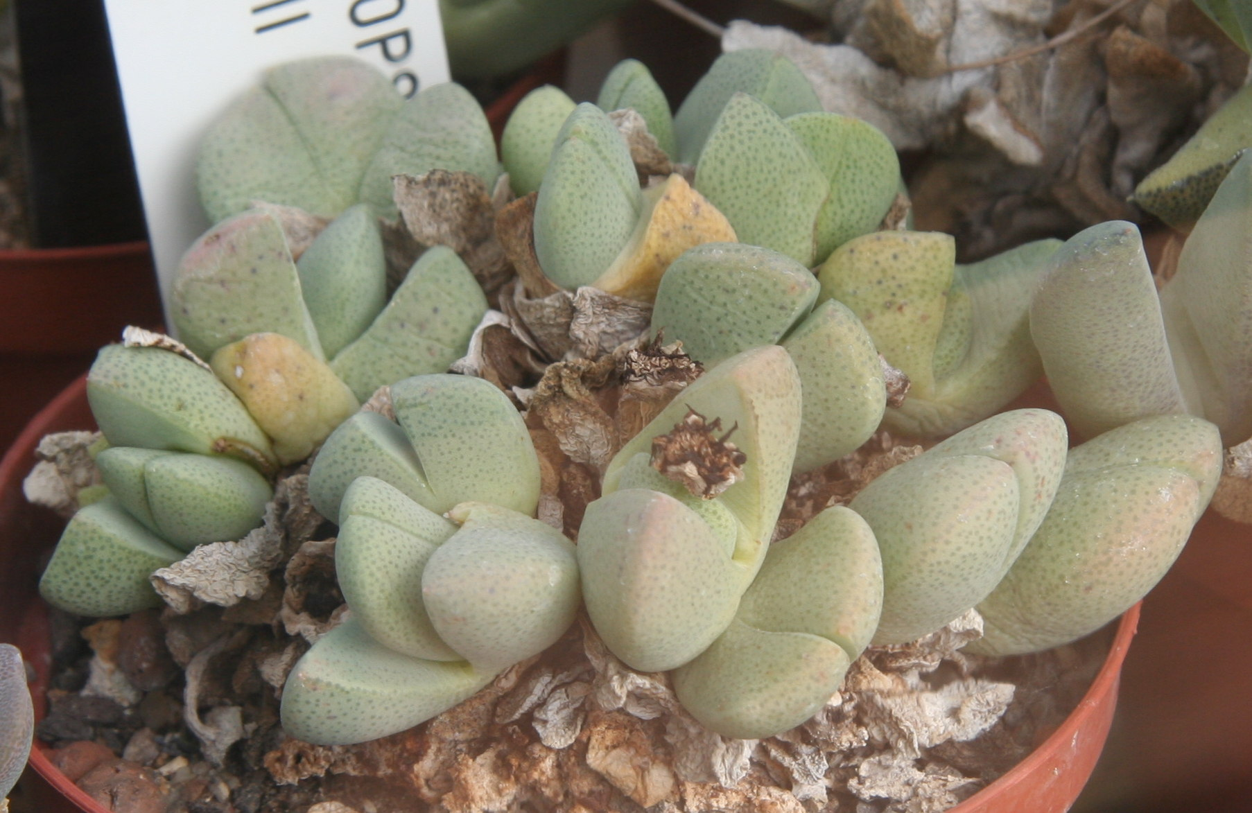 Cheiridopsis brownii im Botanischen Garten Kopenhagen